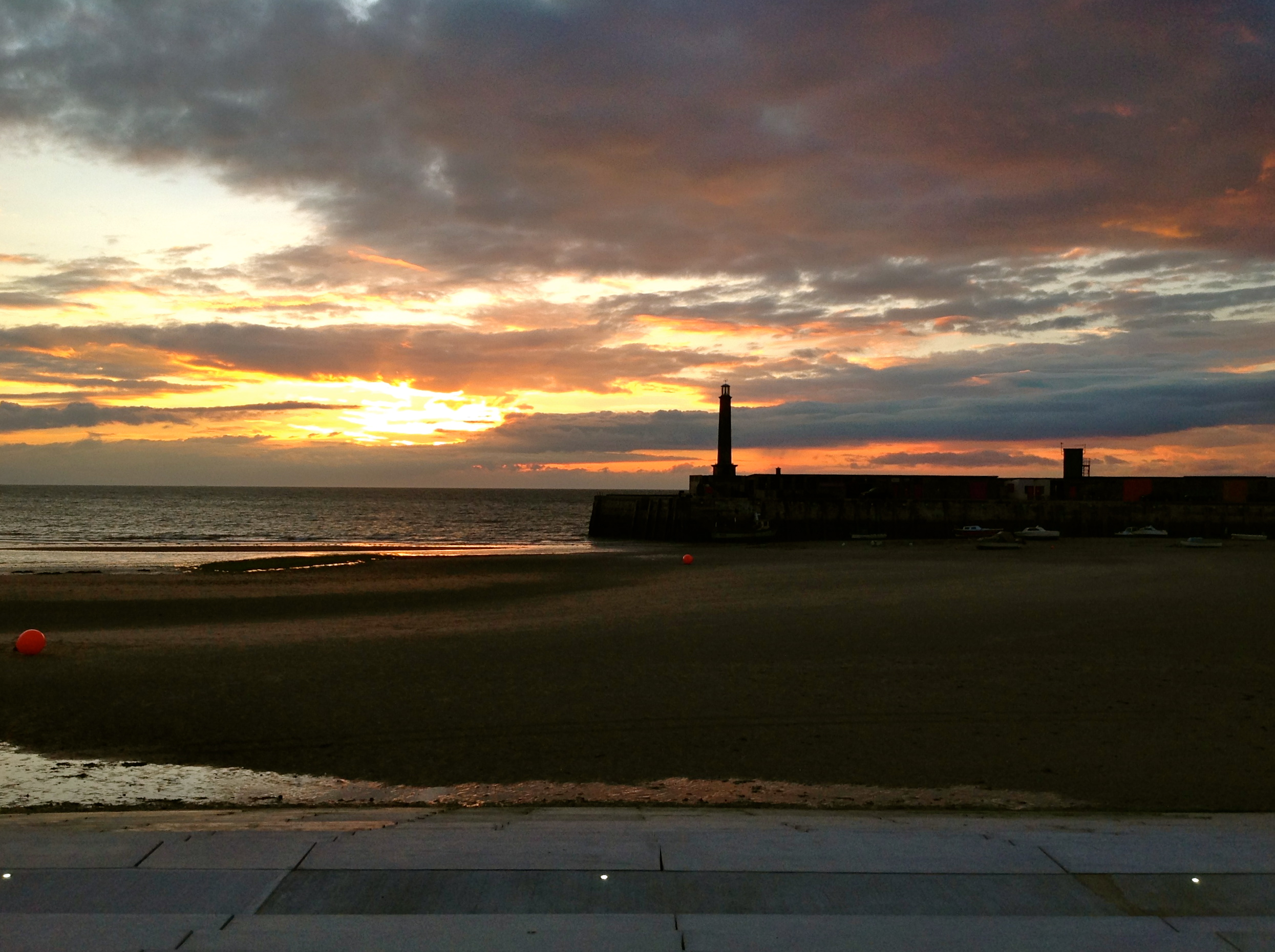 Abendstimmung in Margate 2013